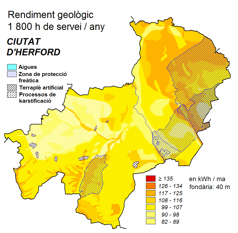 Mapa geotèrmica de la ciutat d'Herford, Alemanya